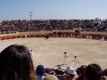 Stieren'gevecht' arena Stes Maries de la Mer